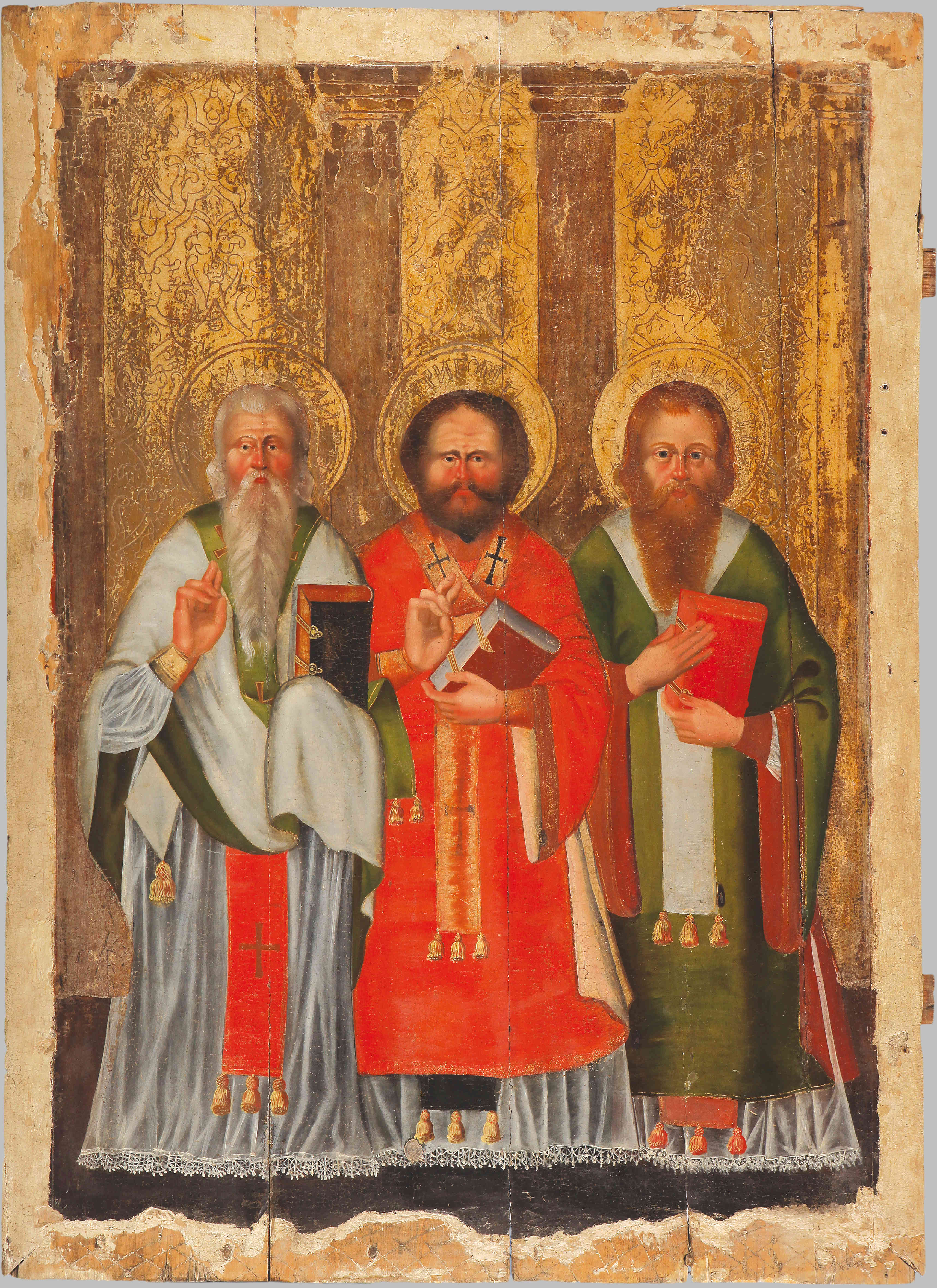 XVIII век Дерево, левкас, темпера 137х98 Происходит из Пречистенской церкви городского поселка Шерешево Брестской области Поступила в 1963 году ДБЖ-87 Реставрация: И.В. Ярыгина, С.И. Голубев, М.Г. Малкин, А.Т. Деднянков (Государственный Русский музей, Ленинград). 1974